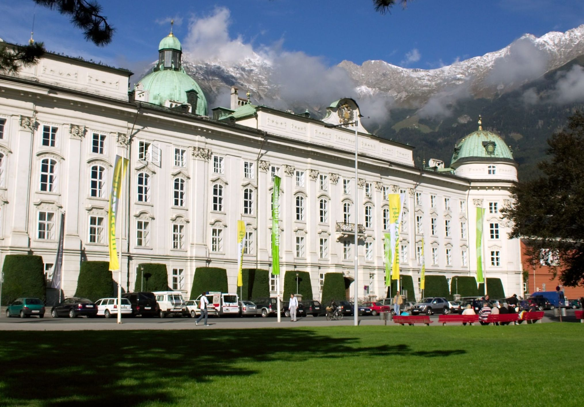 Hofburg in Innsbruck, Tirol, Austria